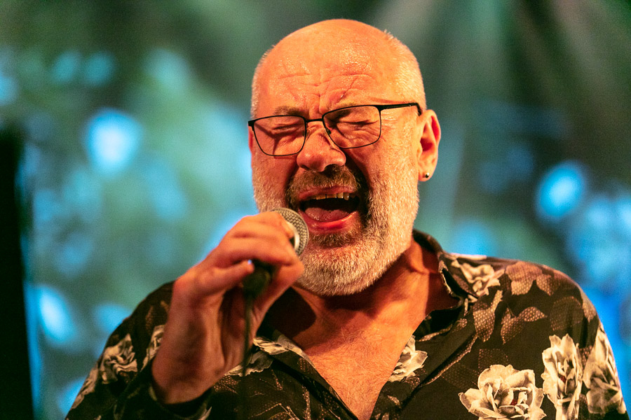 Den skotske sangeren Fish på scenen på Rockefeller i Oslo onsdag 3. oktober 2018. Fish var tidligere vokalist i det britiske bandet Marillion.